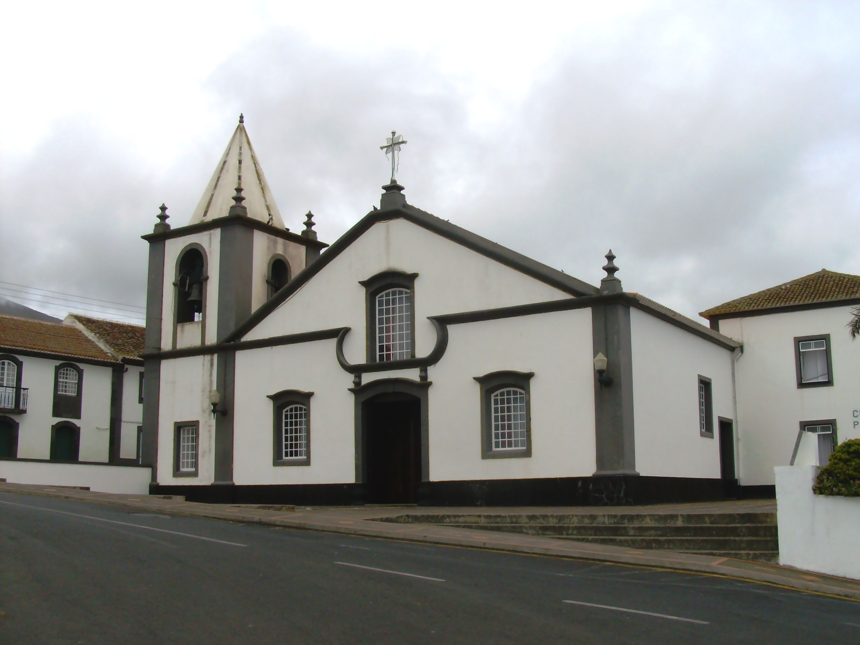 Igreja de Santa Bárbara, Santa Bárbara, Angra do Heroísmo, Ilha Terceira, Açores: fachada.